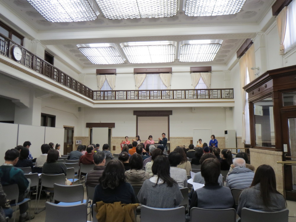 じゅうろくてつめいギャラリーの使用例（篠笛コンサート）